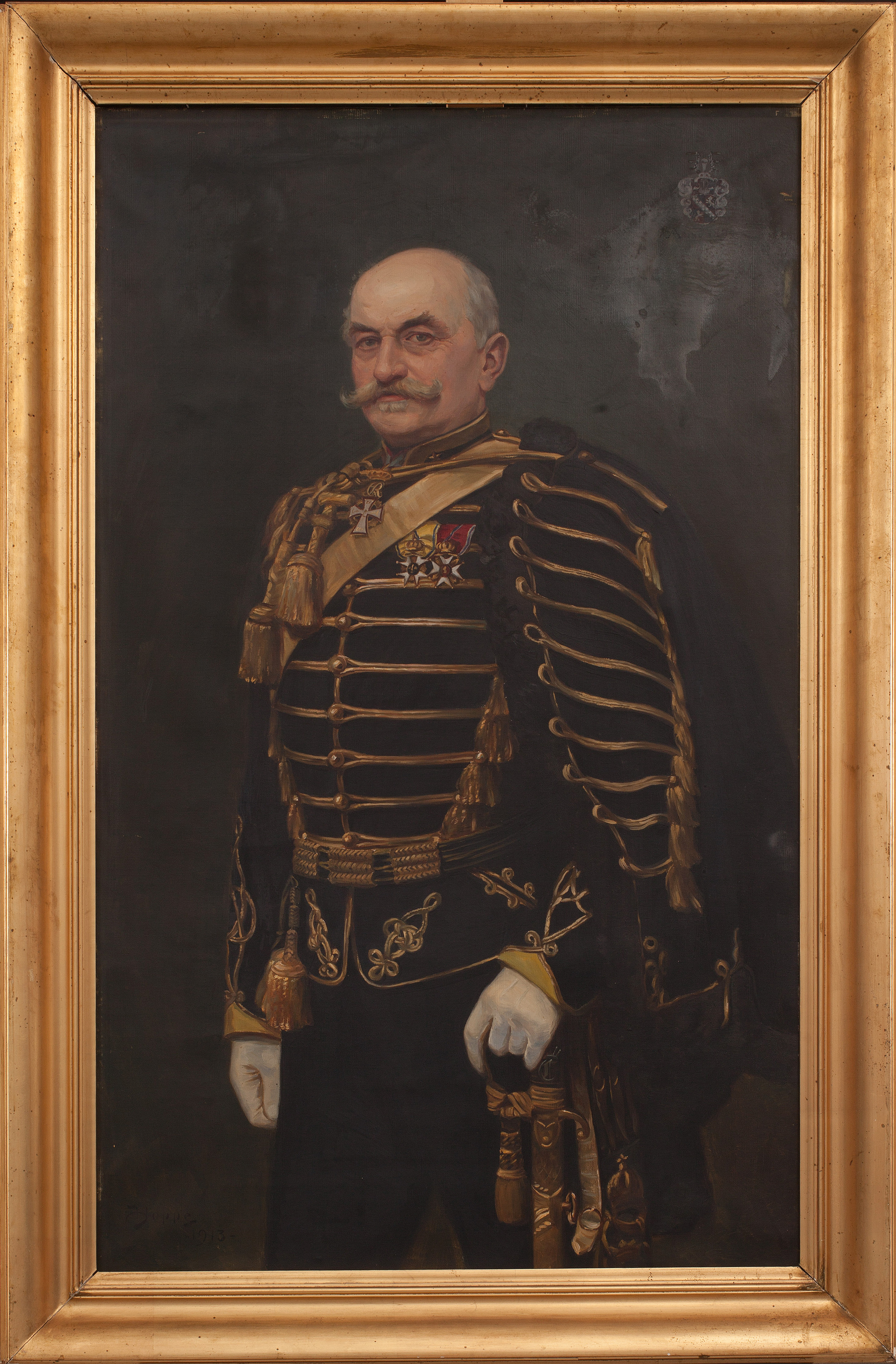 Carl Albrekt Holger Rosencrantz (1823-1912) avporträtterad i uniform för en major vid Husarregementet Konung Karl XV. Målning av Bruno Hoppe.